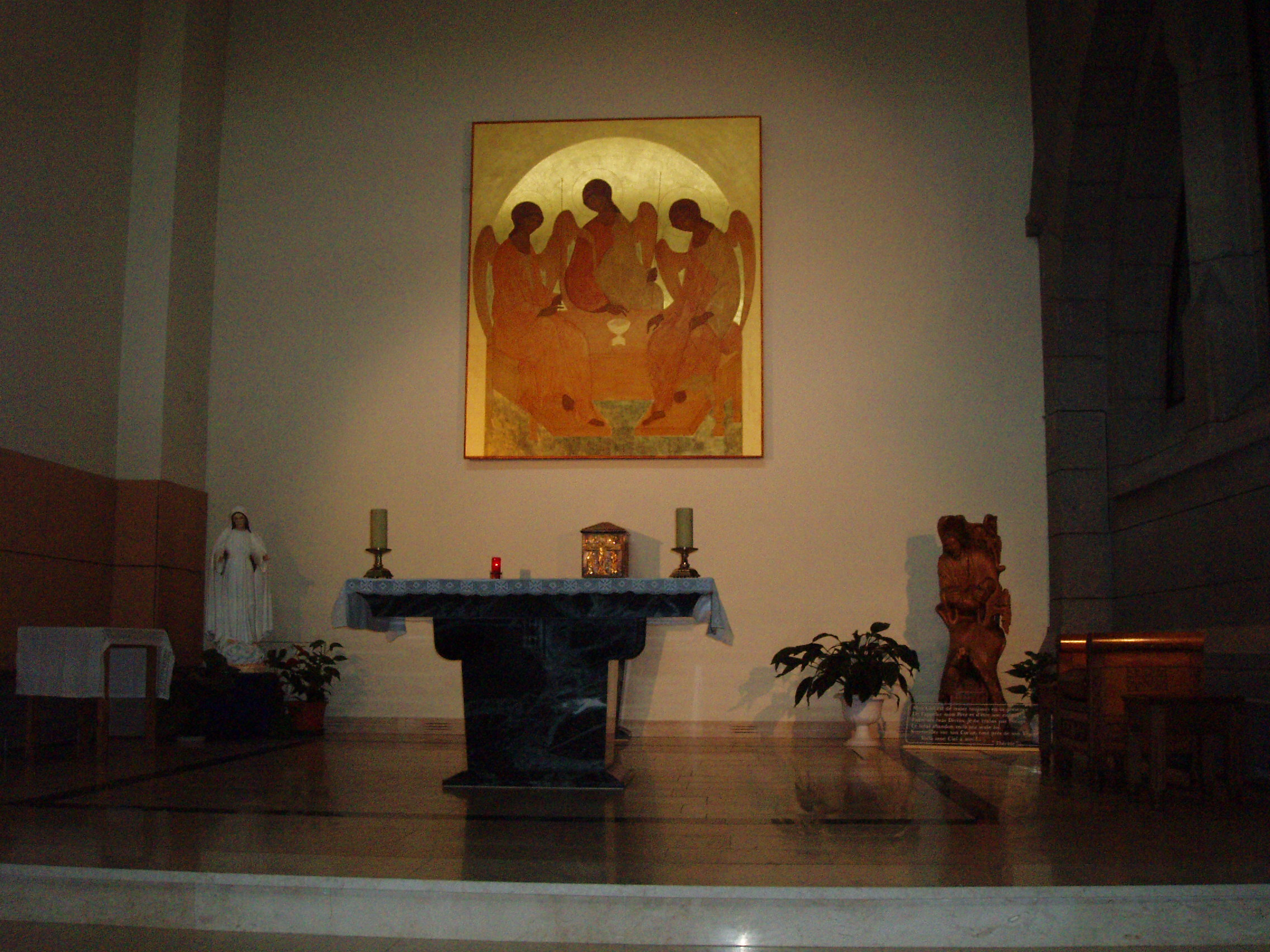 chapelle